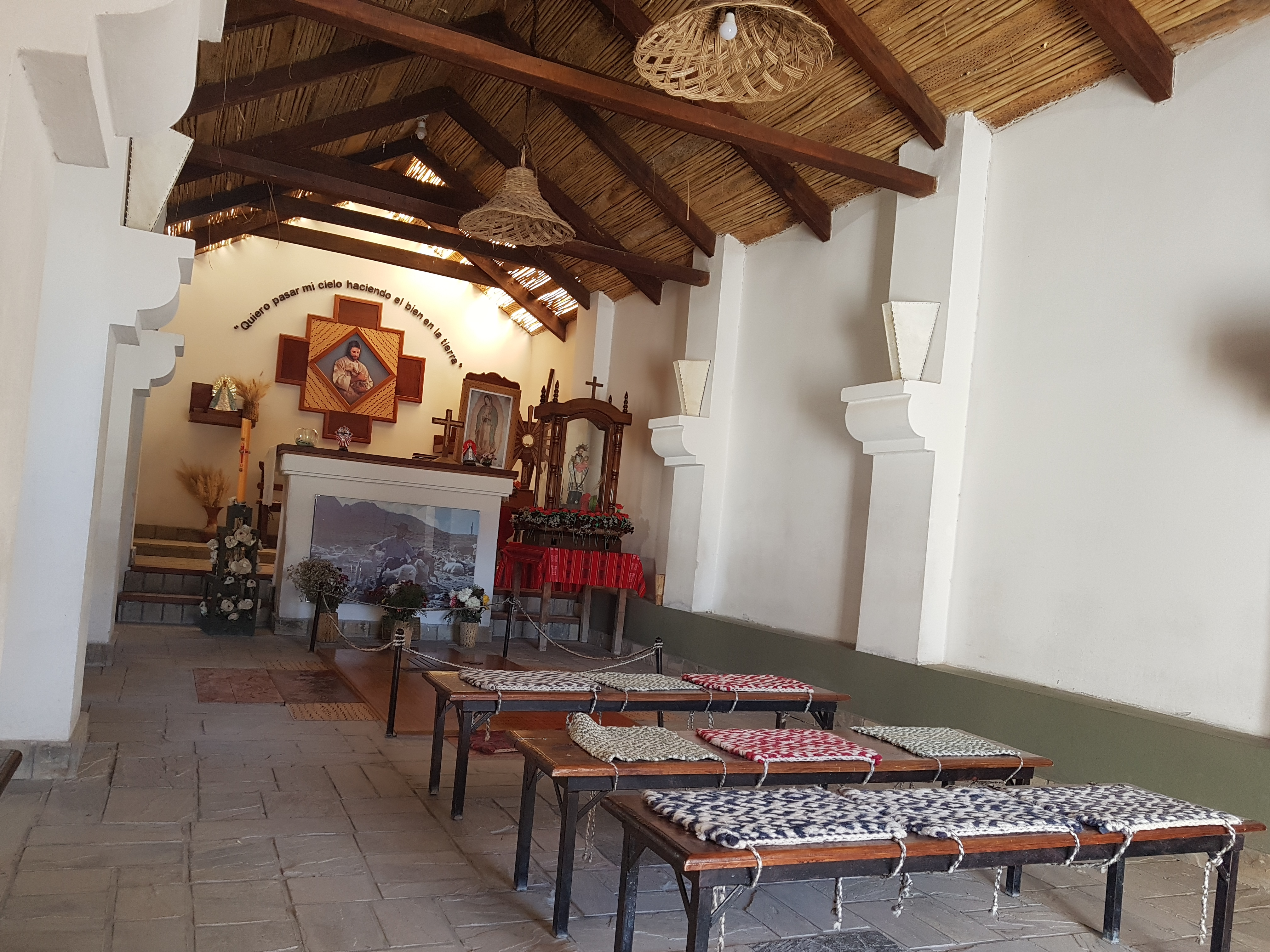 Capilla en honor a San Cayetano. Construida en los años 1.915 aprox. Remodelada y ampliada en el año 2012. En su interior se encuentran sepultados los restos del Padre Chifri, fallecido el 23/11/2011. Fundador del Colegio Secundario albergue de Montaña El Alfarcito n^ 8214.interior de capilla